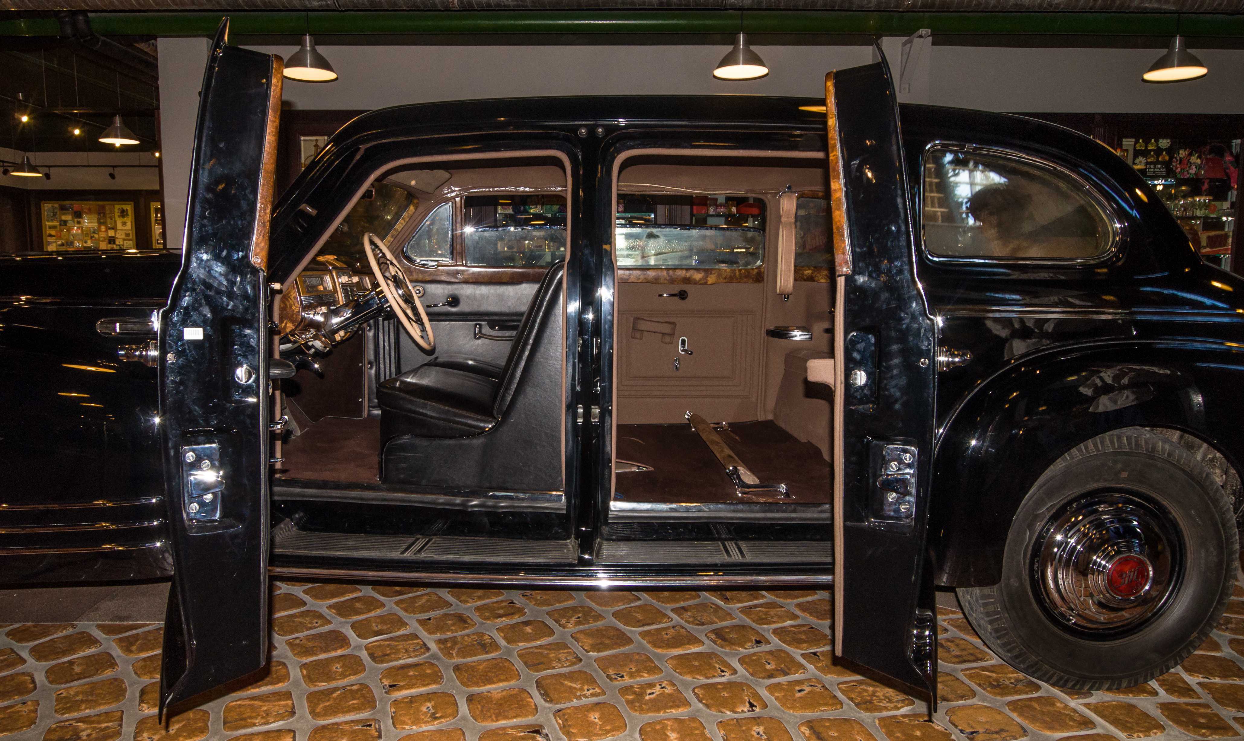 Бронированные двери весом по 250 кг каждая (толщина стекол - 7,5 см) ЗИС-115, принадлежавшего И. В. Сталину.